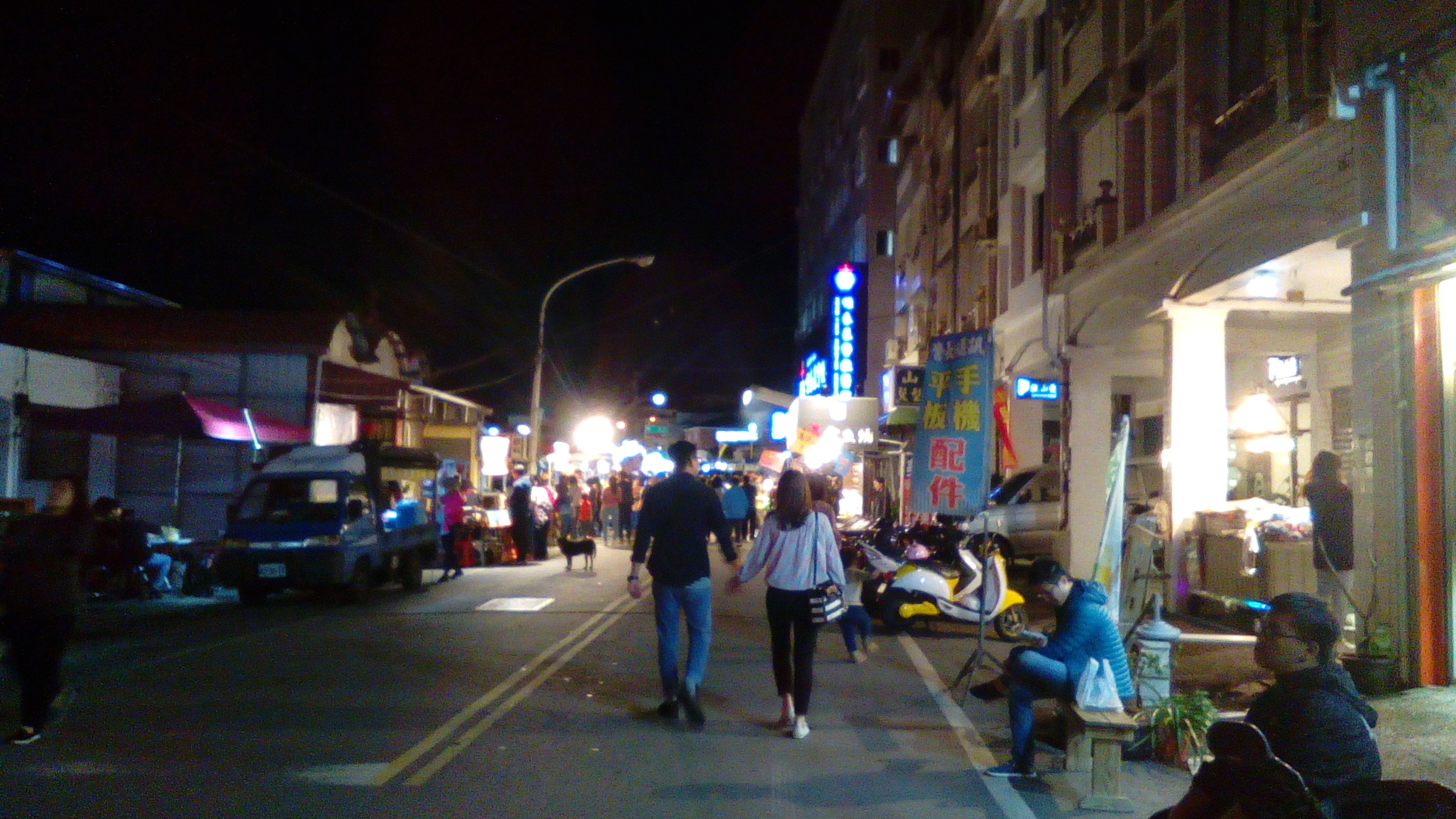 位於恆基旁